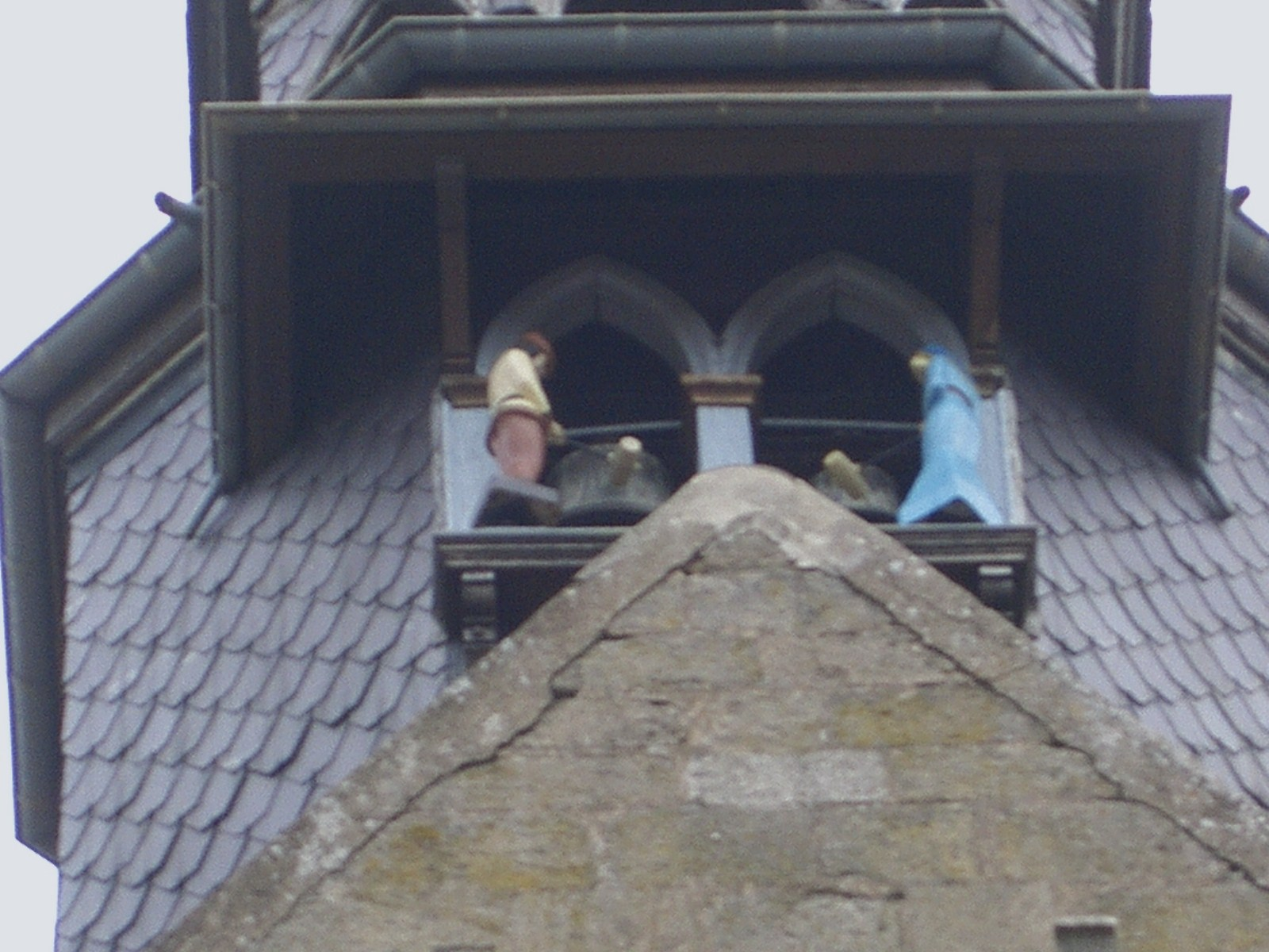 Jacquemart an der Kirchturmuhr von Nolay, Côte-d'Or, Frankreich.